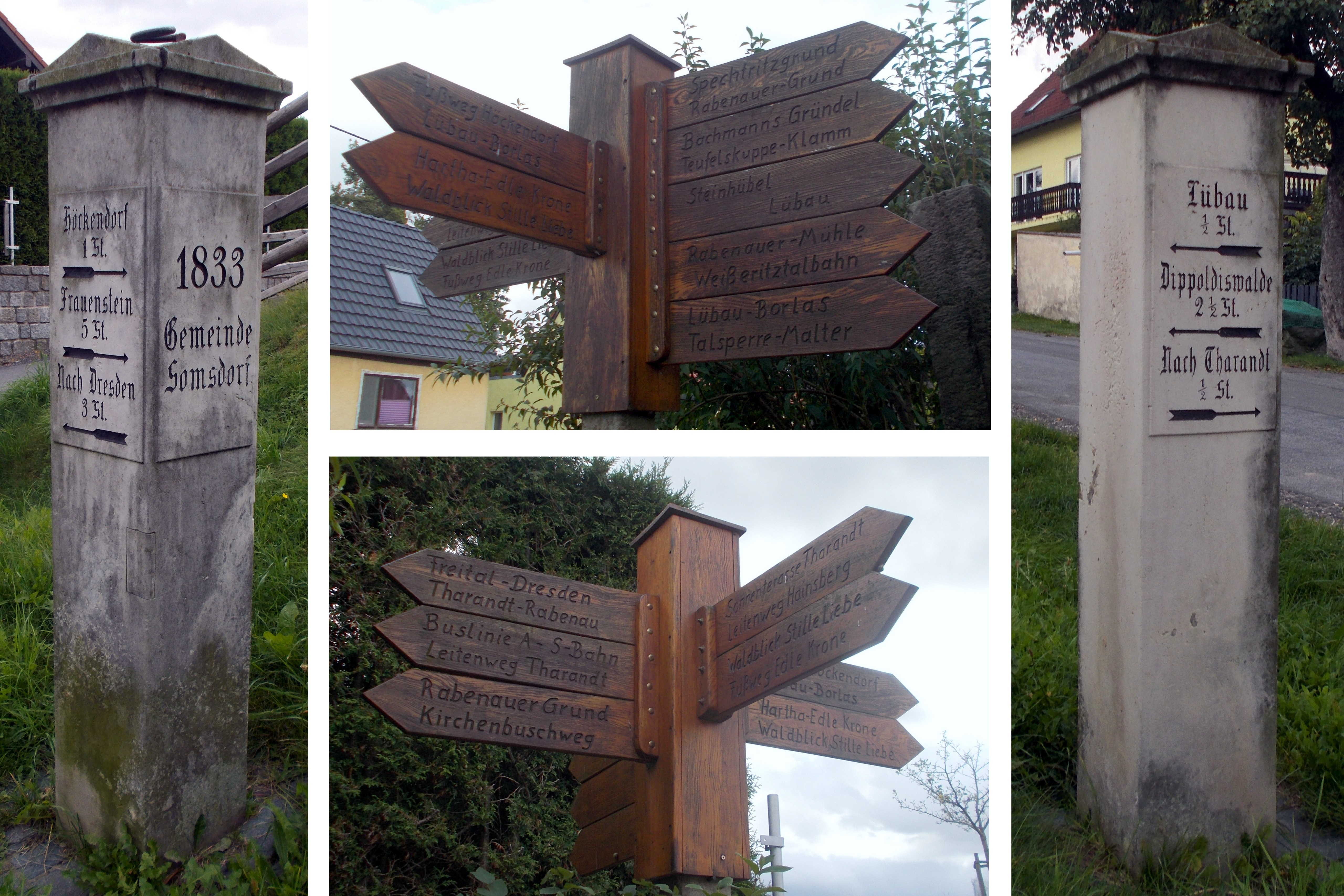 2017 Somsdorf Wanderwegweiser Säule Butterstraße